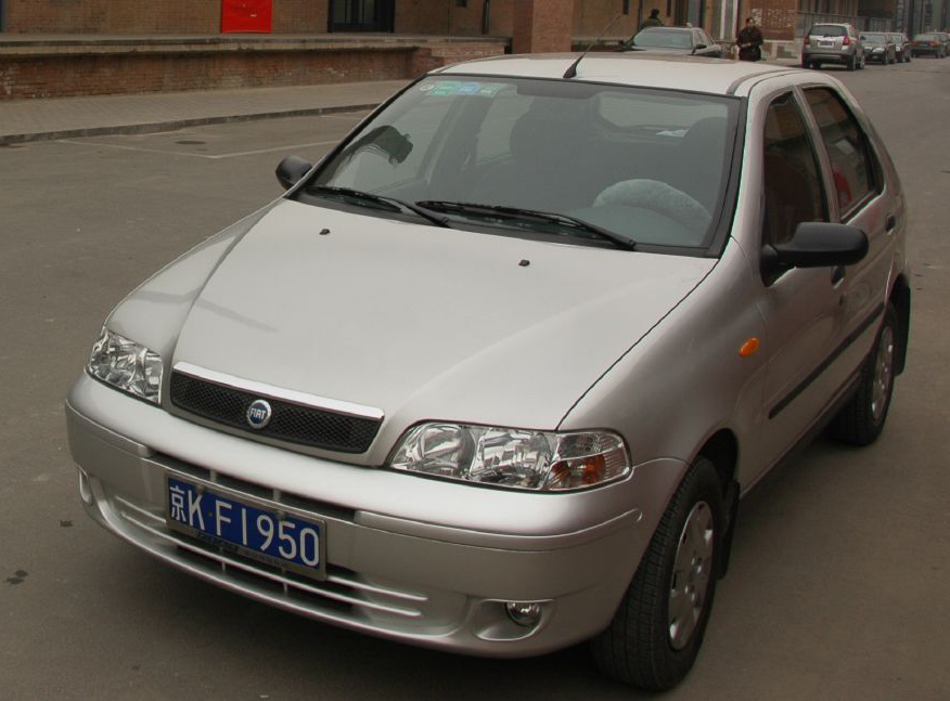 Nanjing Fiat Palio in Beijing - note different grille